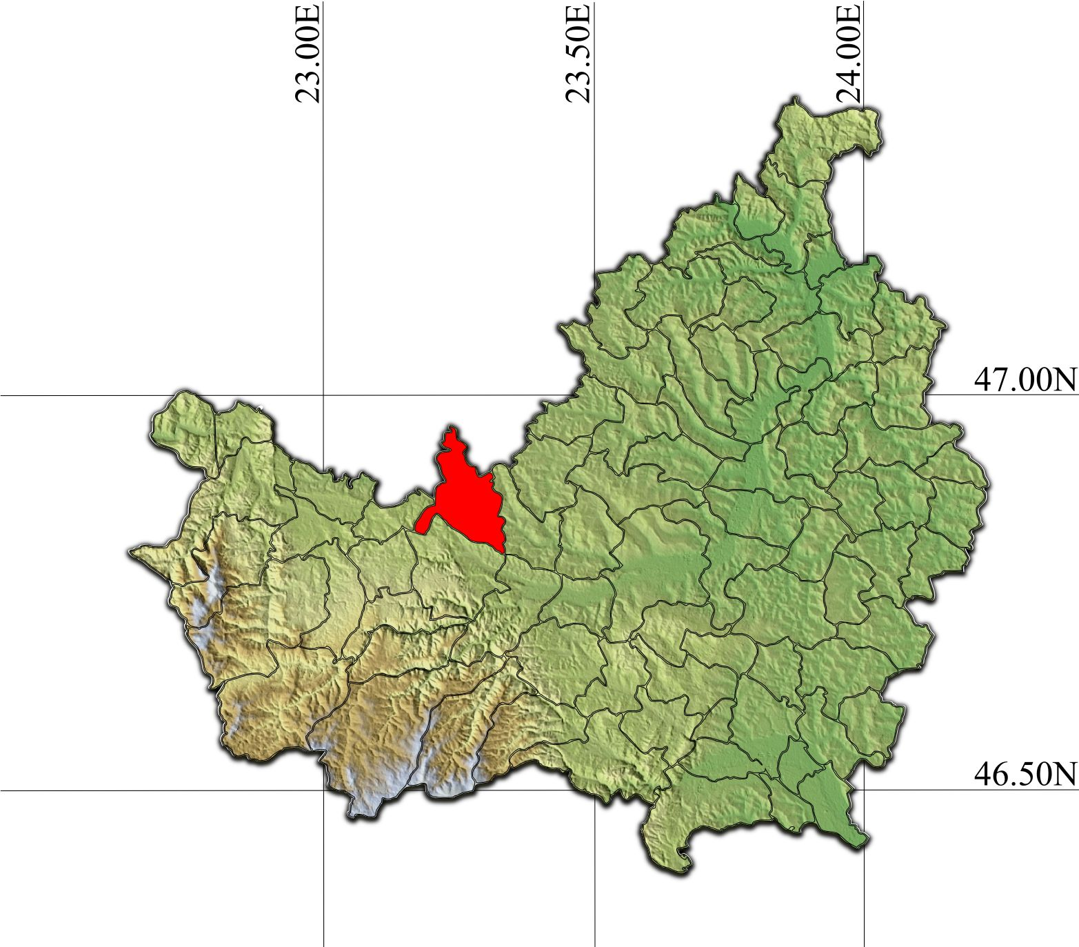 Aghiresu jud Cluj